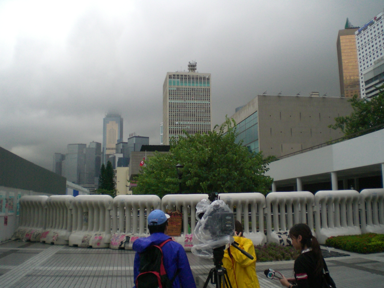 水馬 (路障), 愛丁堡廣場望添馬艦 (香港)及灣仔.